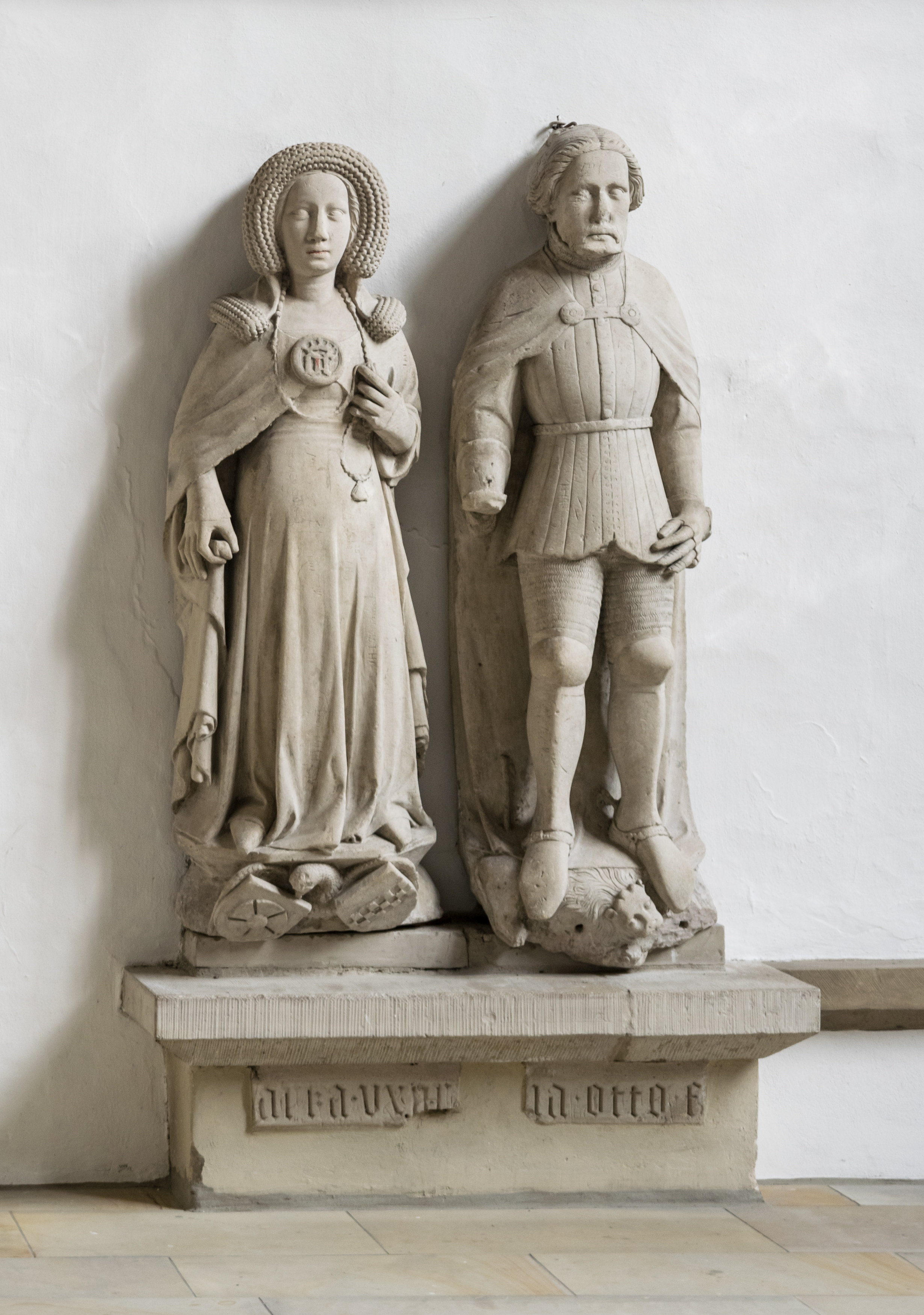 Sarkophagplatte von Otto zur Lippe und Ermgard von der Mark in der Kirche St. Marien in Lemgo